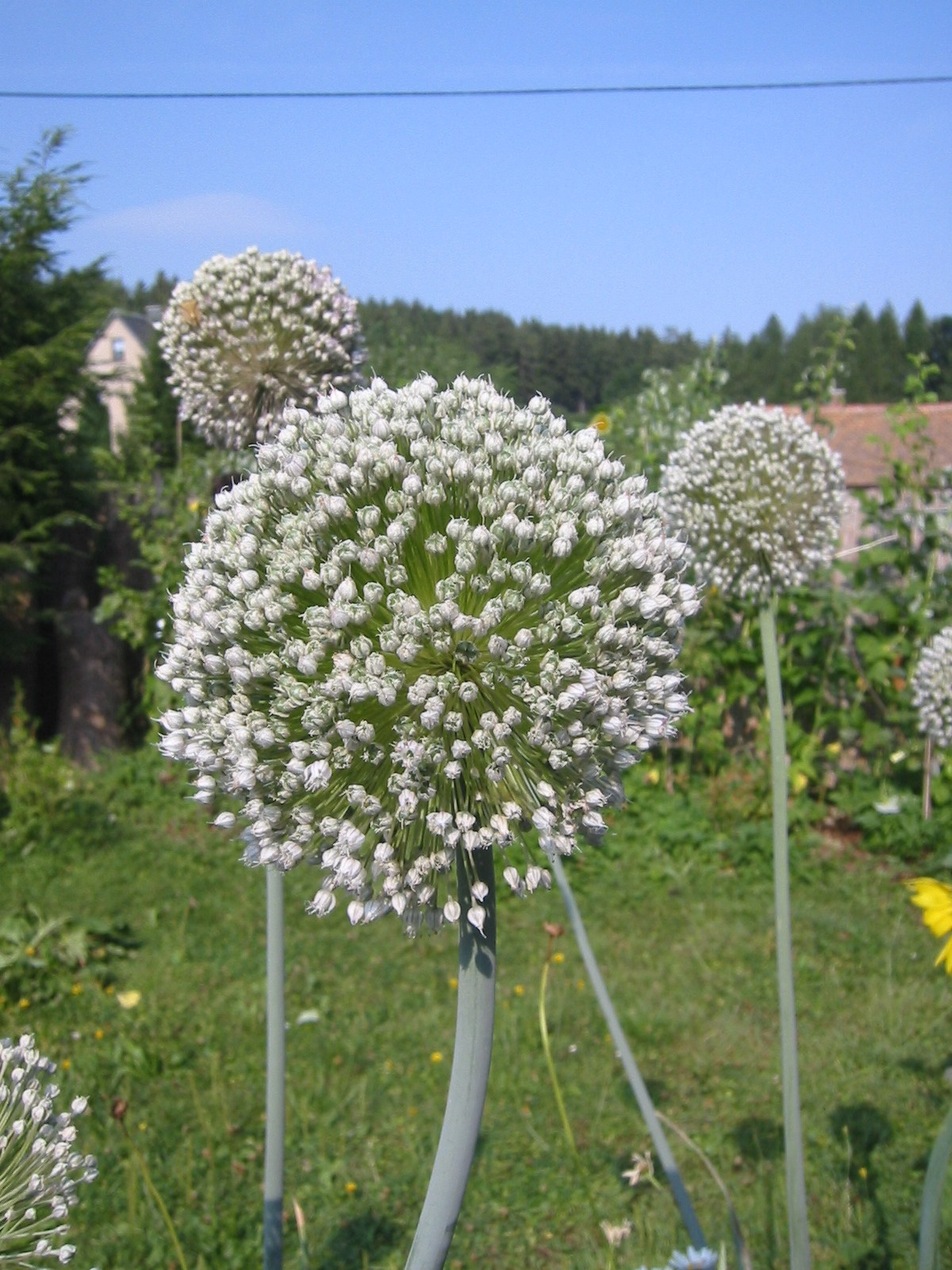 kleines Feld blühender Porreepflanzen